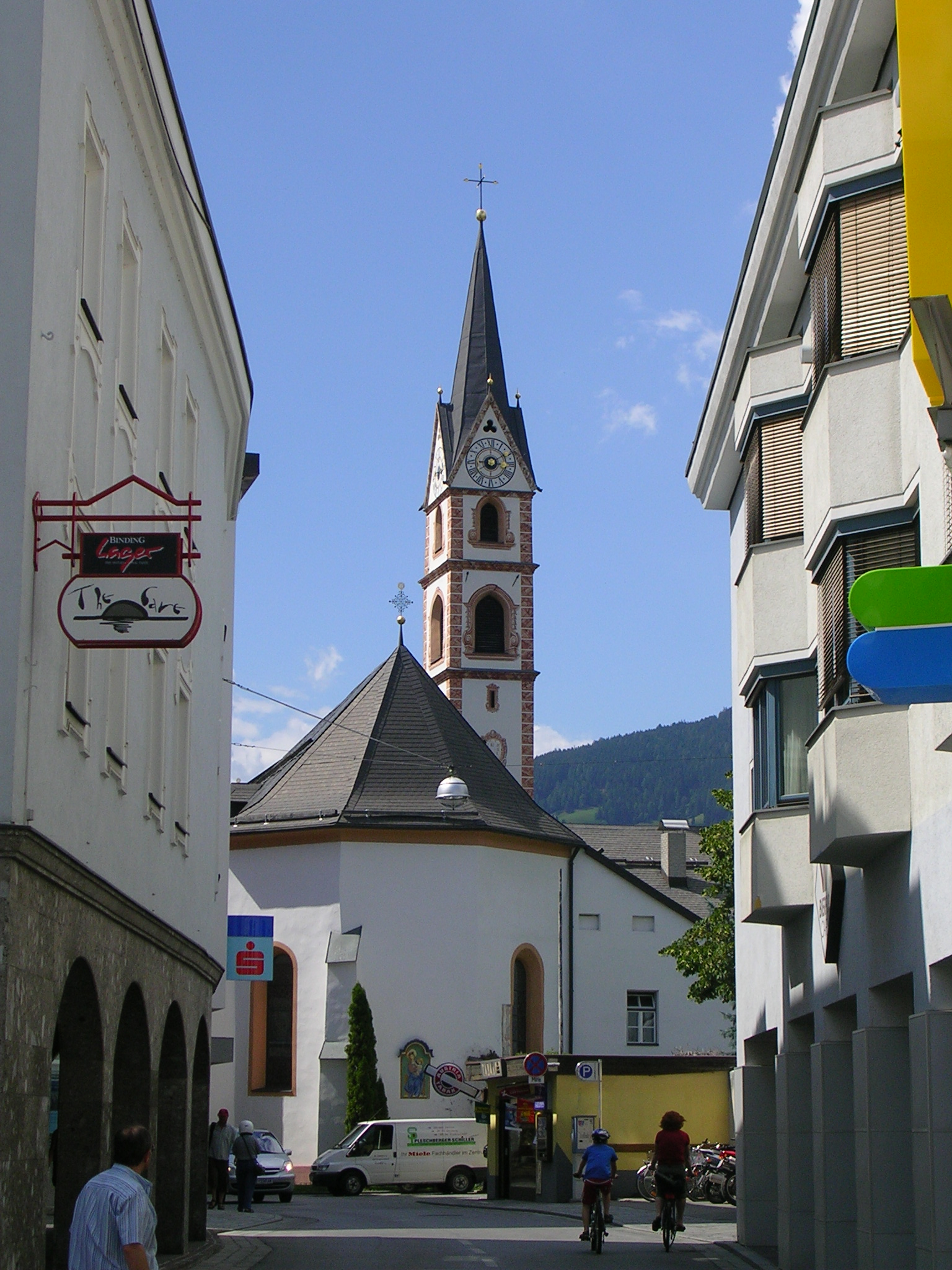 Die Franziskanerkirche des Franziskanerklosters in Lienz)